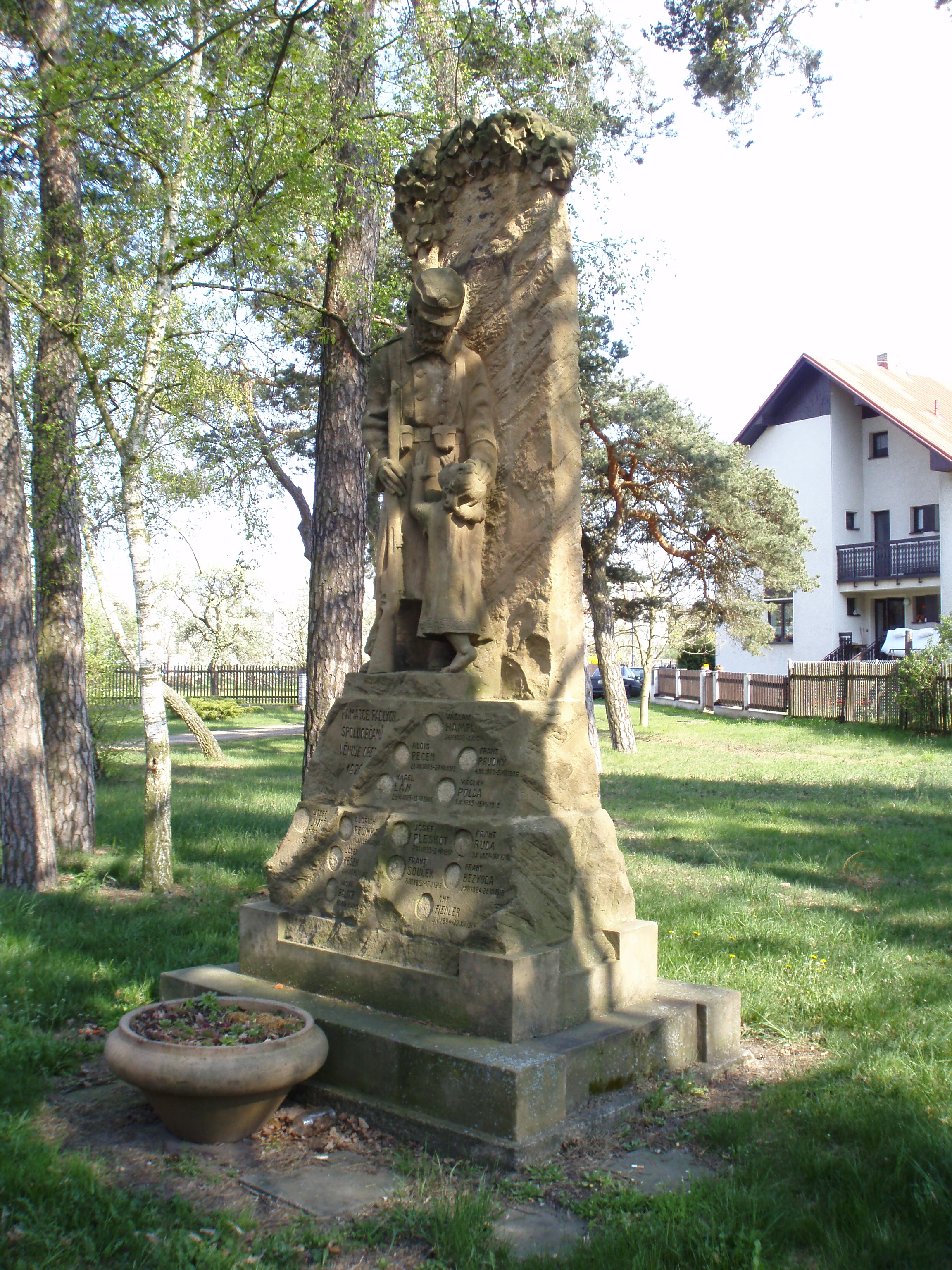 Pomník padlým v Březhradě